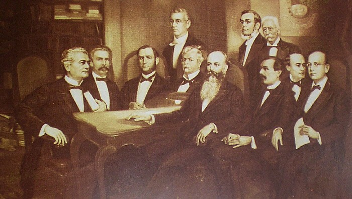 Antonio Guzmán Blanco and his cabinet